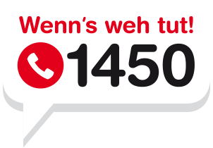 Logo der österreichischen Gesundheitsnummer 1450